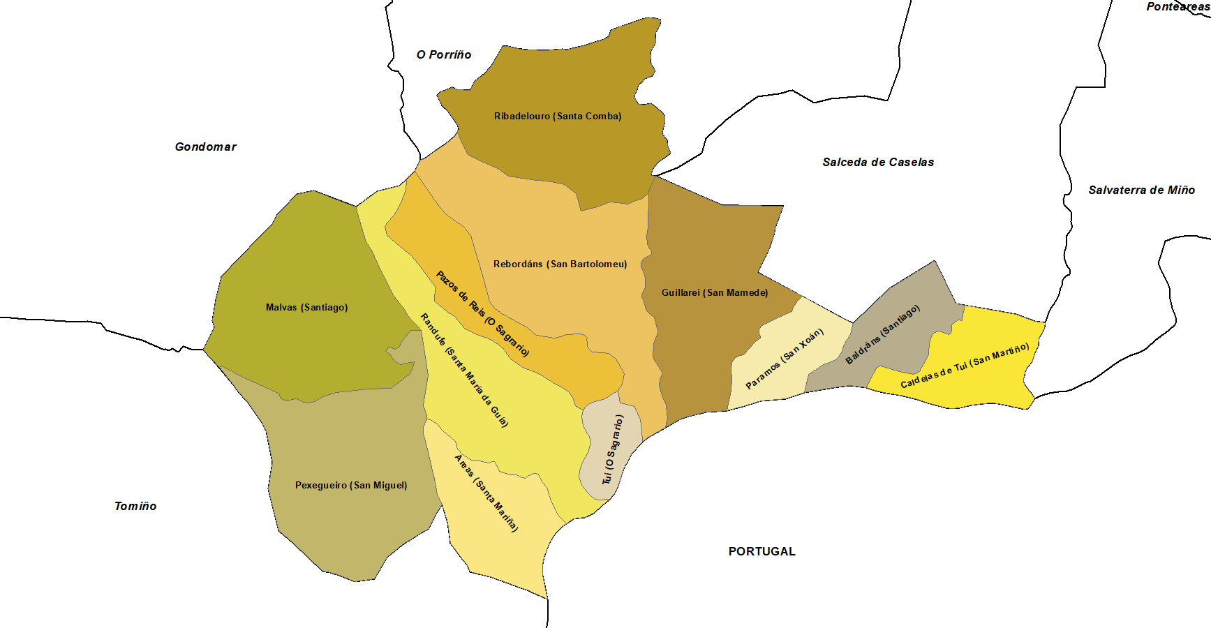 Mapa coa distribución das 12 parroquías de Tui e os concellos limítrofes. Límites obtidos de